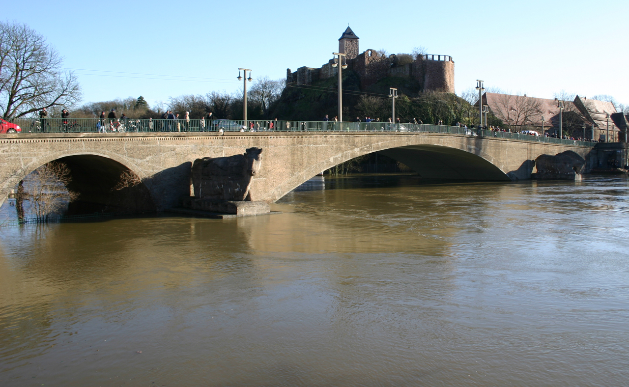 Die Kröllwitzbrücke in Halle (Saale). Im Hintergrund die Burg Giebichenstein.